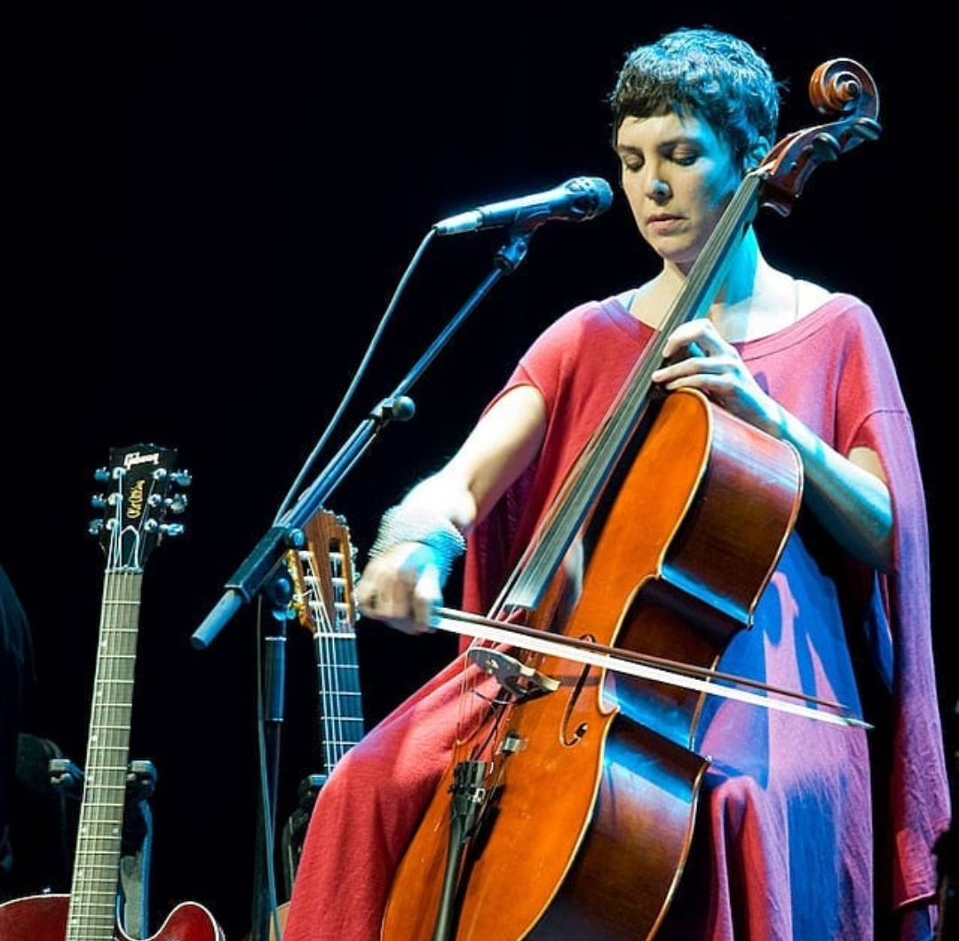 Cantora Adriana Calcanhotto tocando um violino na sua turnê em promoção do disco "Maré" em 2008 no Rio de Janeiro